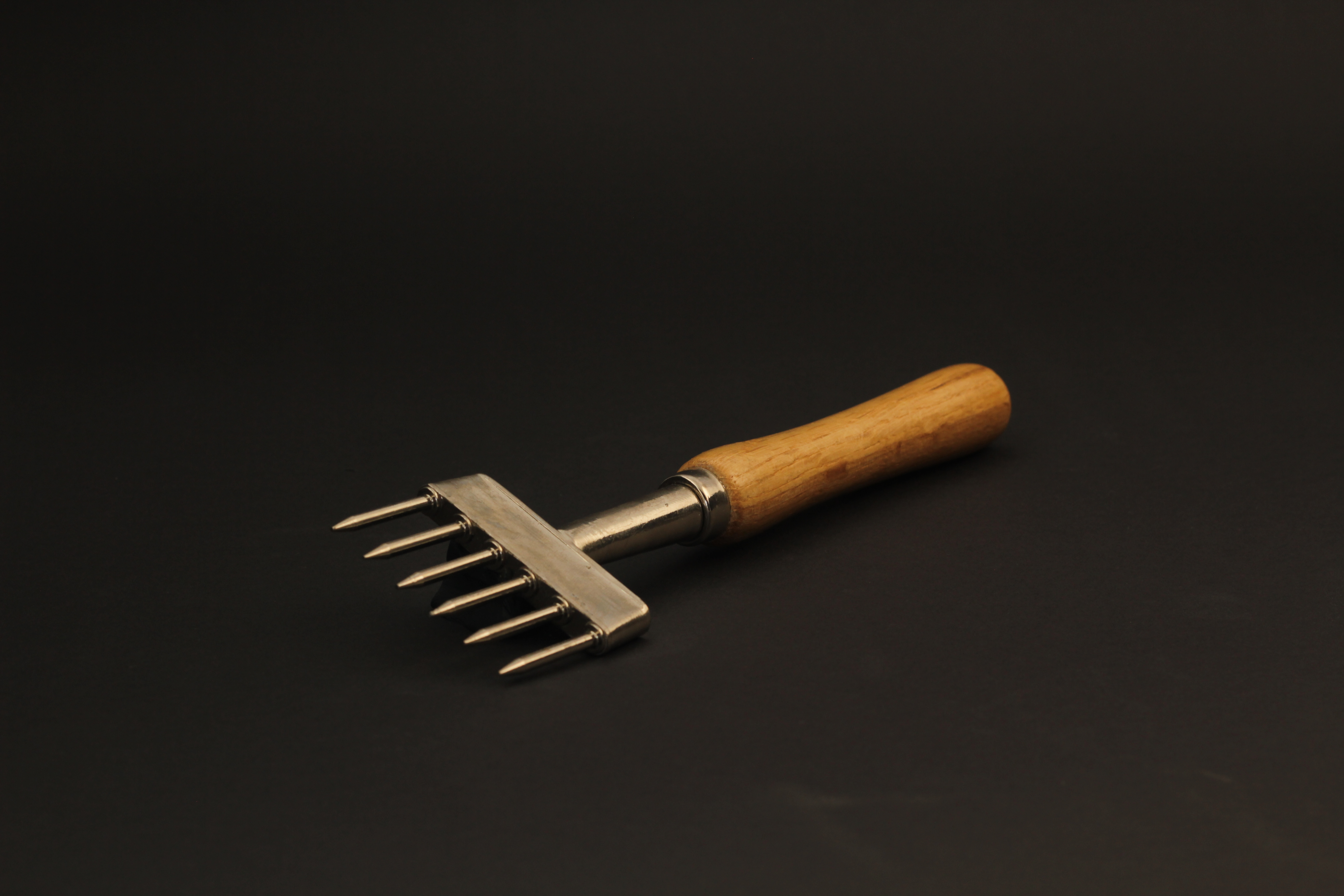 Eispickel